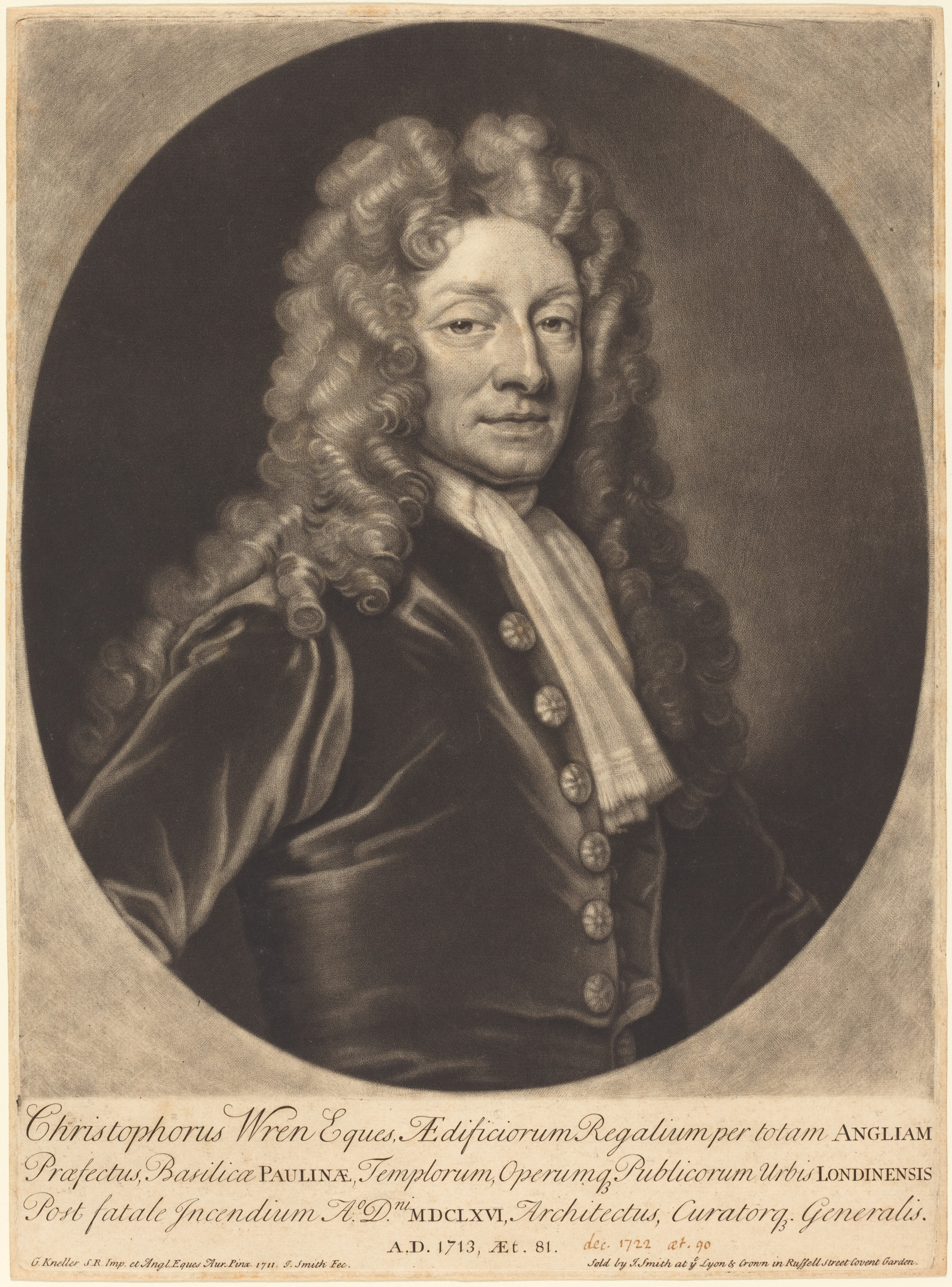 Gravure représentant Christopher Wren